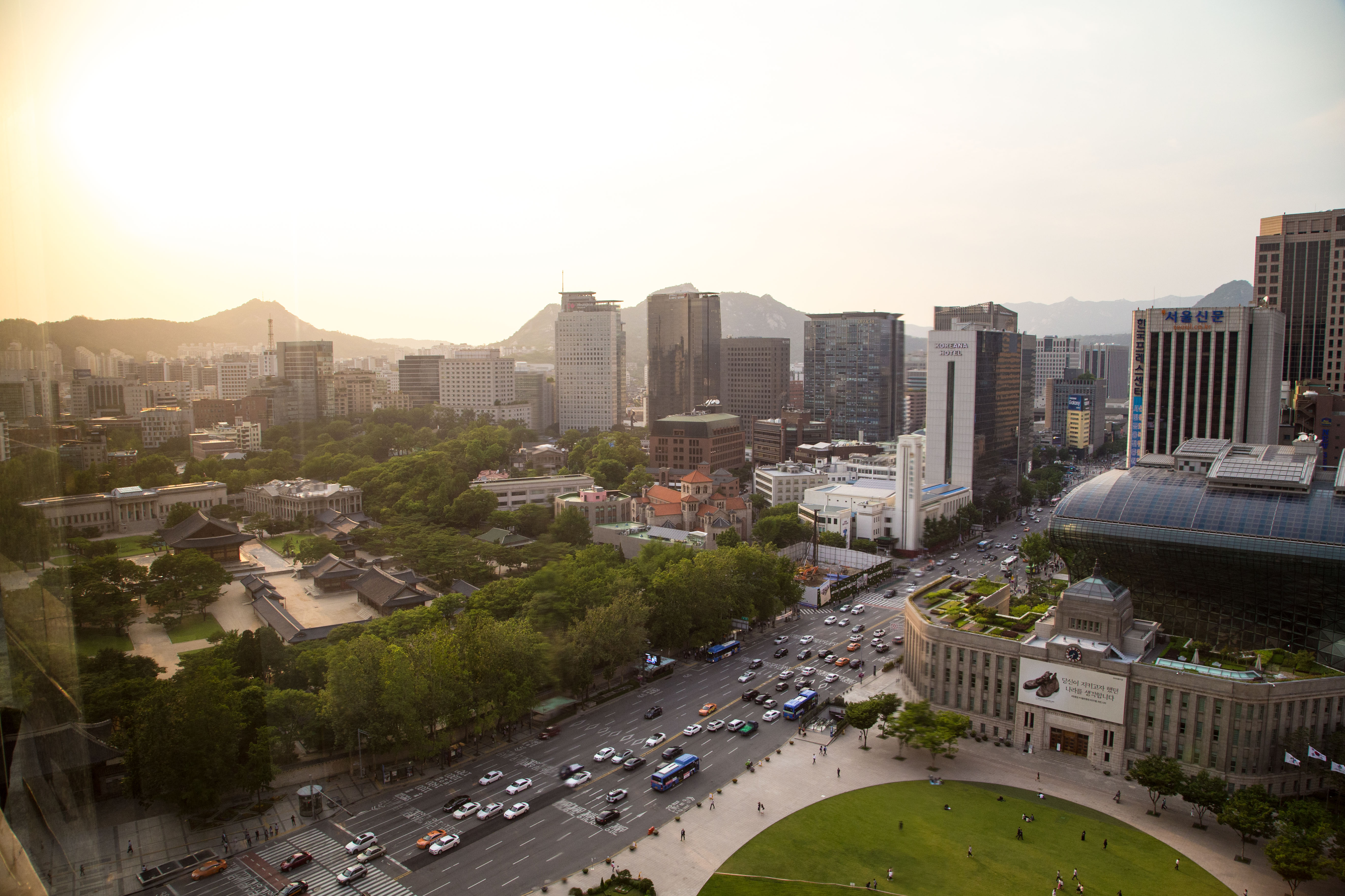 170612-A-HU462-235